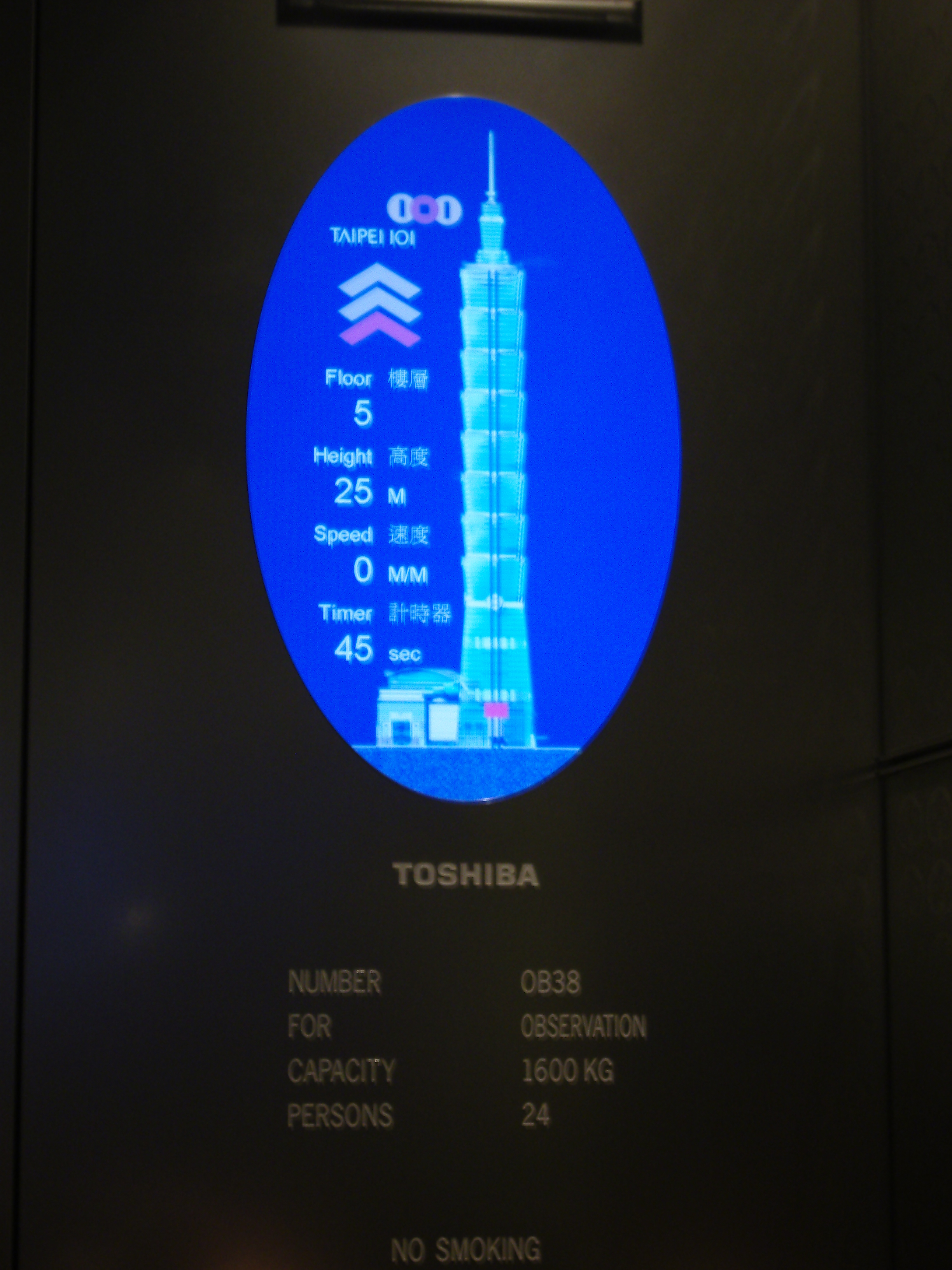 中文（台灣）: 台北101的東芝電梯說明。Bân-lâm-gú: Tâi-pak-101 ê Toshiba tiān-thui sueh-bîng. 台北101的東芝電梯說明。